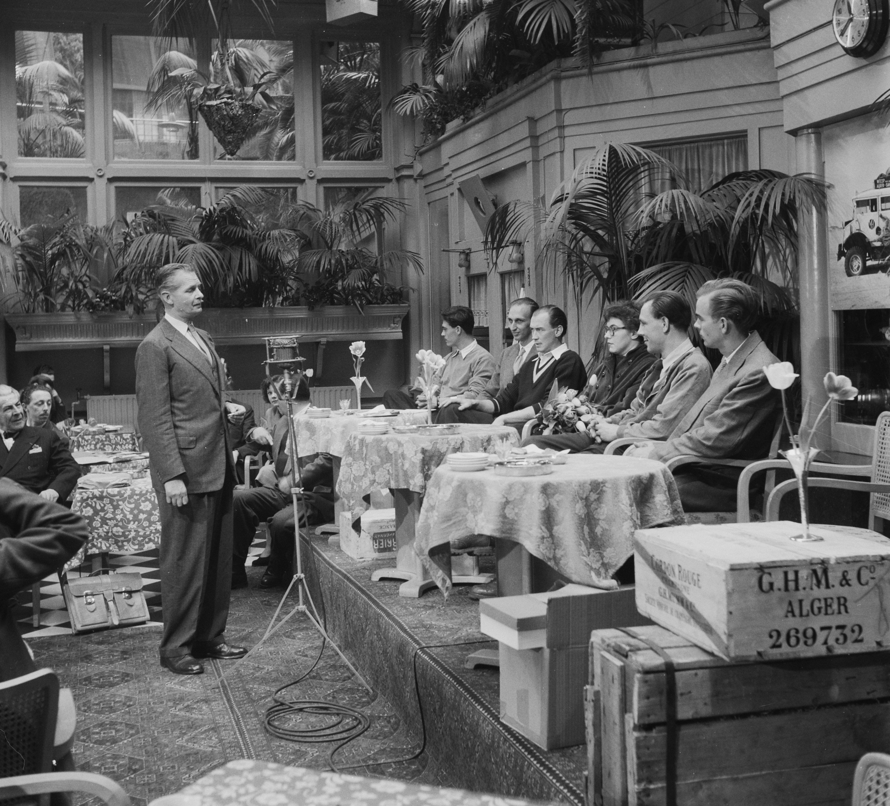 Van Houten expeditie. Terugkeer in Amsterdam. Van achter naar voor achter de tafel: Joes Odufré, fotograaf Frits Lemaire, cineast Theo van Haren Noman, Mimi Jaffré (vriendin van Van Gasteren), producer Lou van Gasteren (die toen nog Lou genoemd werd omdat zijn vader, de toneelspeler, als Louis bekend stond); naam voorste man onbekend. Degene die de toespraak houdt, links op de foto, is Jaap van Mesdag, een van de firmanten van Van Houten.12 april 1952